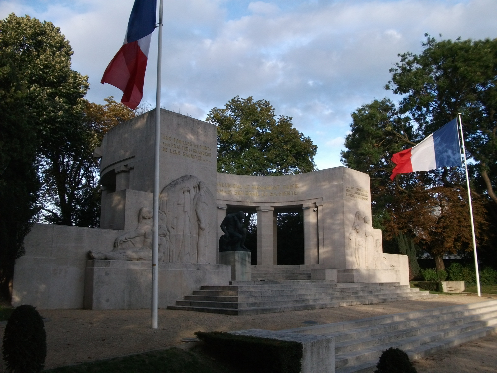 Monument aux morts de la ville Reims, place de la République, adossé au cimetière du nord.